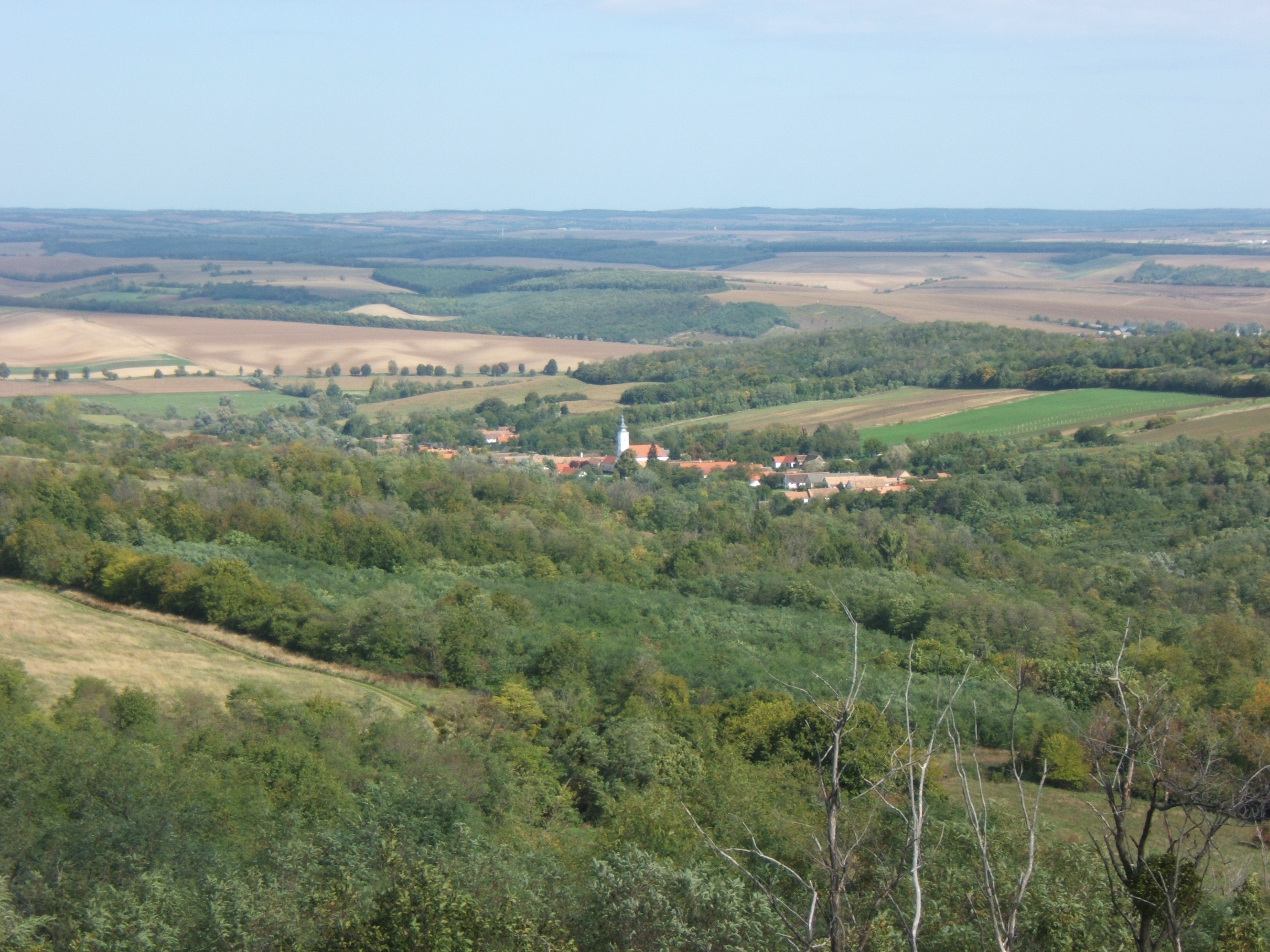 Somogydöröcske látképe